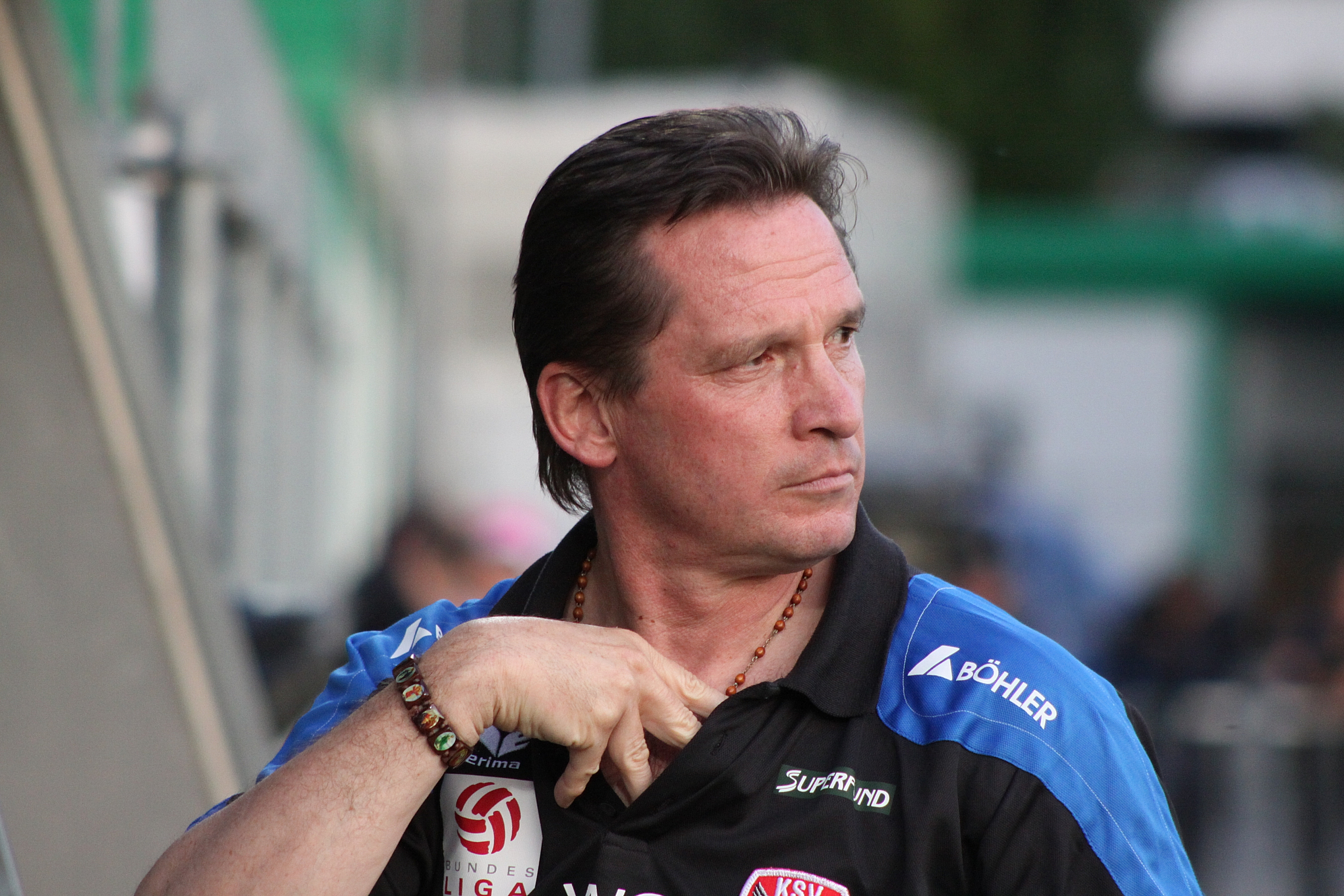 Werner Gregoritsch, Trainer – Kapfenberger SV (Bild 4)